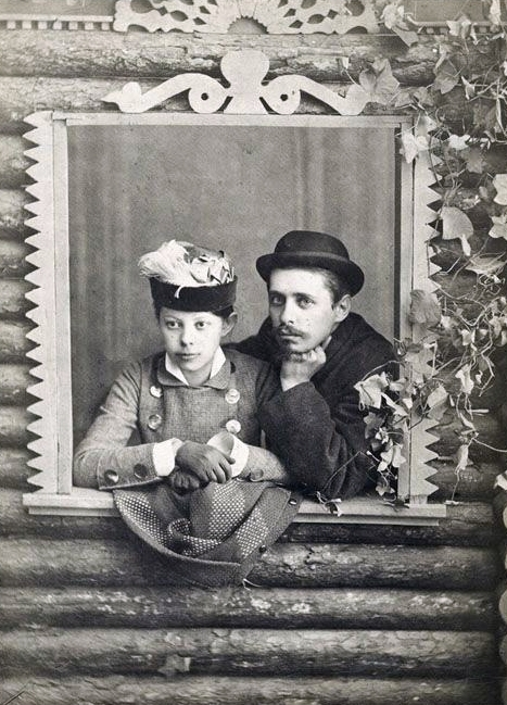 Николай Георгиевич Гарин-Михайловский с женой Надеждой Валерьяновной (урожденной Чарыковой)